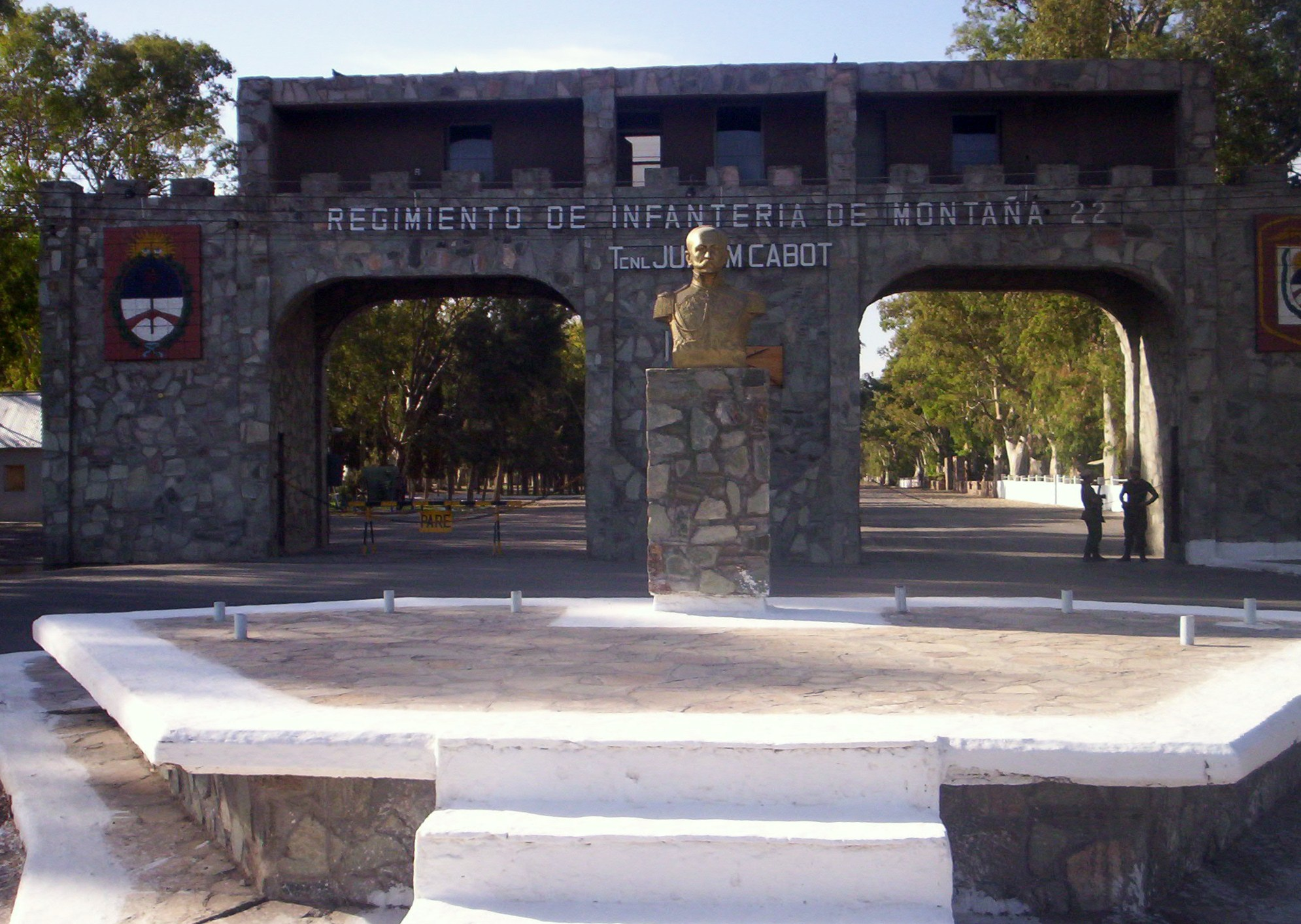 el regimiento Cabot en la entrada al marquesado